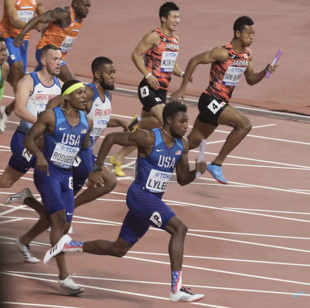 DOH80519 4x100m men final lyles